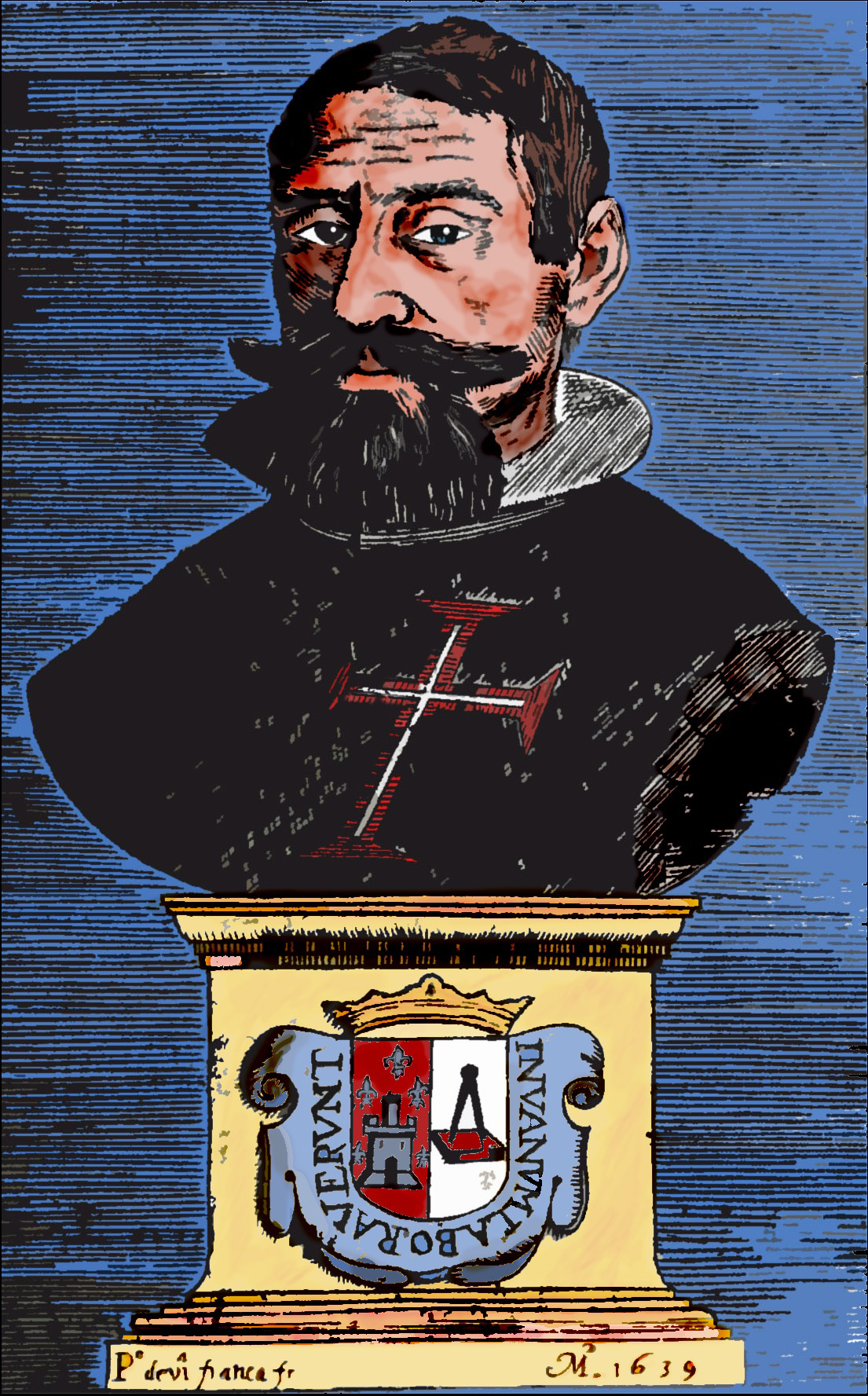 Portrait de manuel de Faria e Sousa, in Asia Portuguesa